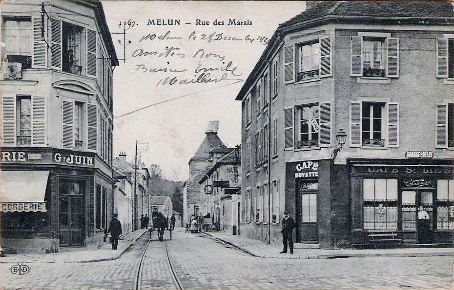 Rails du tramway de Verneuil, rue des Marais (actuellement rue Camille Flammarion) à l'intersection de la rue Saint-Liesne.